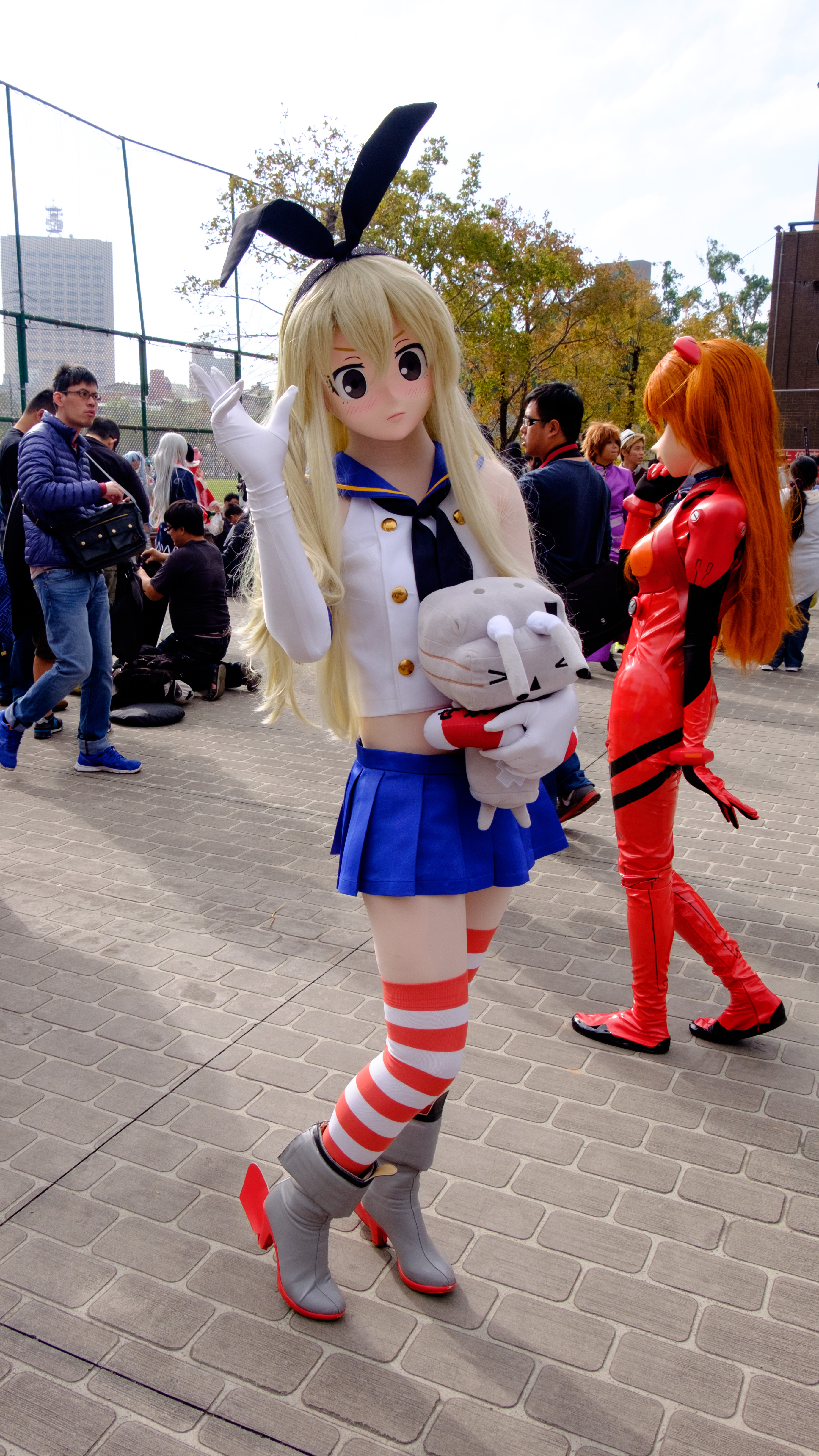 CWT41第一日下午，手持聯裝砲ちゃん布偶的＜艦これ＞驅逐艦島風艦娘布偶裝Cosplayer。